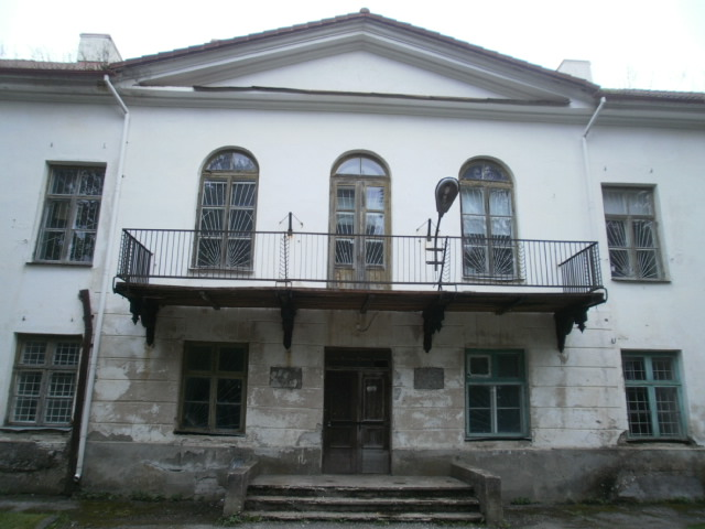 Kasti mõisa praegune peasissekäik lääneküljel. Kunagise oletatava peatorni asukoht.